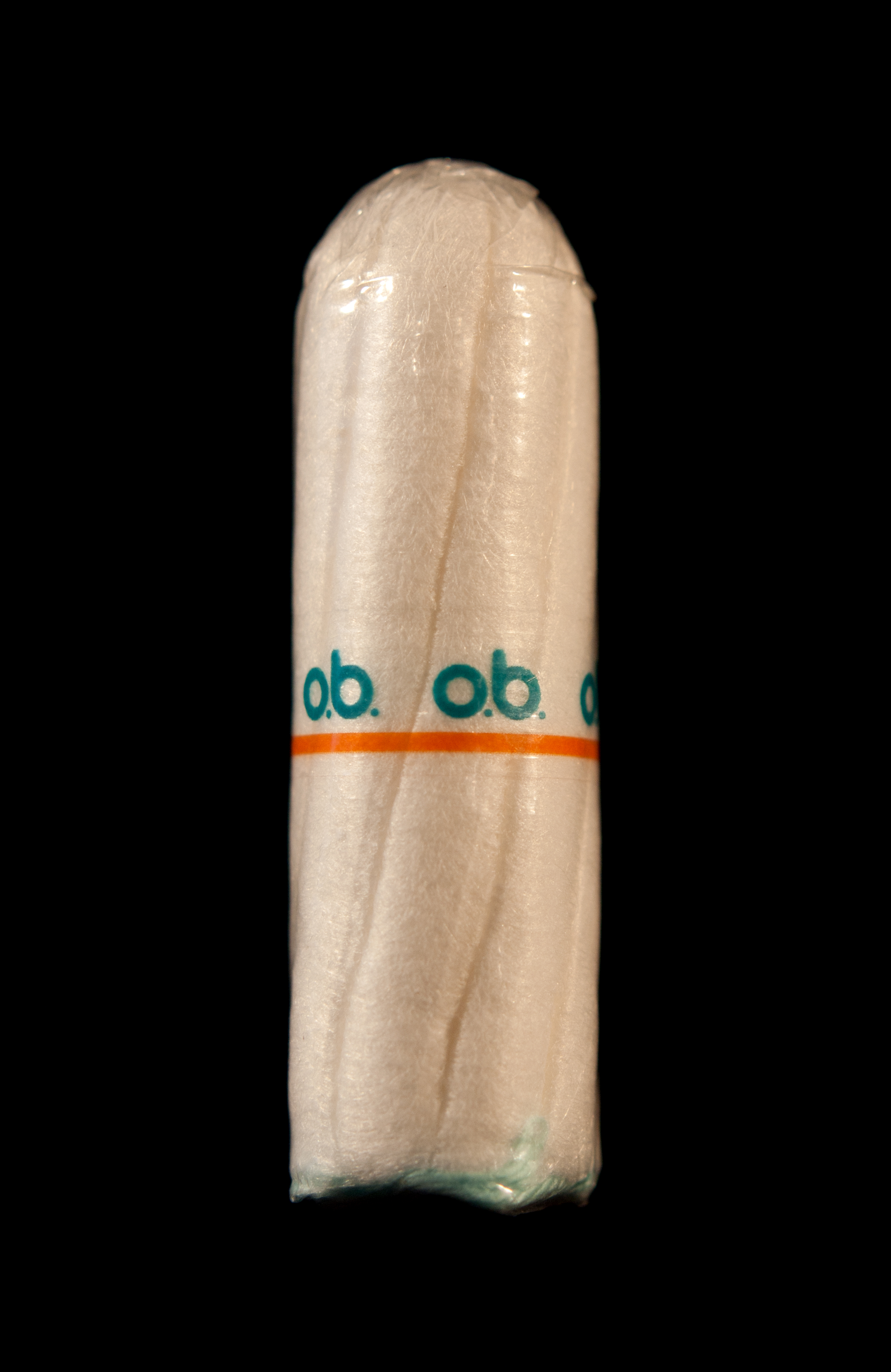 Ein Tampon der Marke o.b.